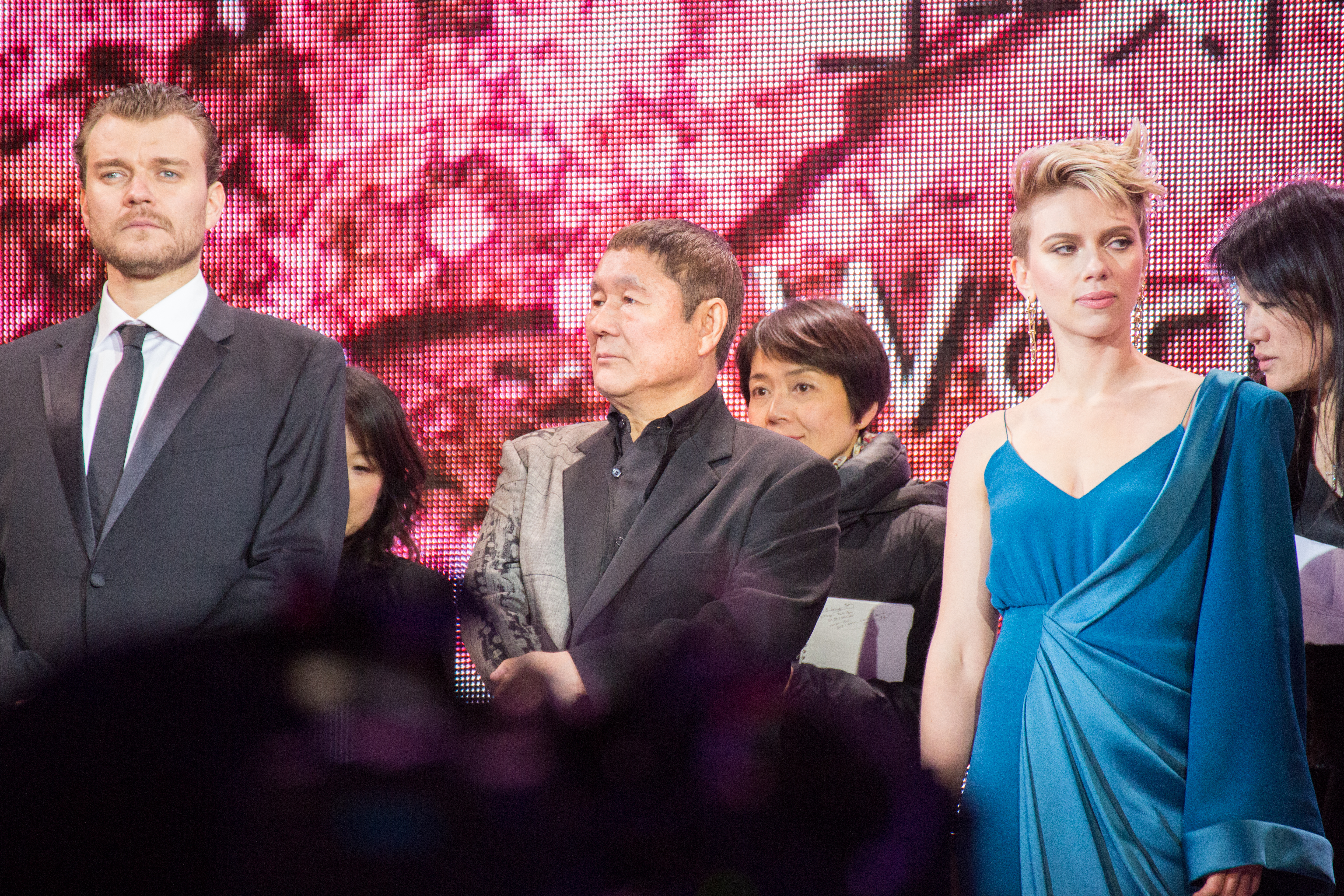 ゴースト・イン・ザ・シェル ワールドプレミアレッドカーペット ピルー・アスベック ビートたけし スカーレット・ヨハンソン